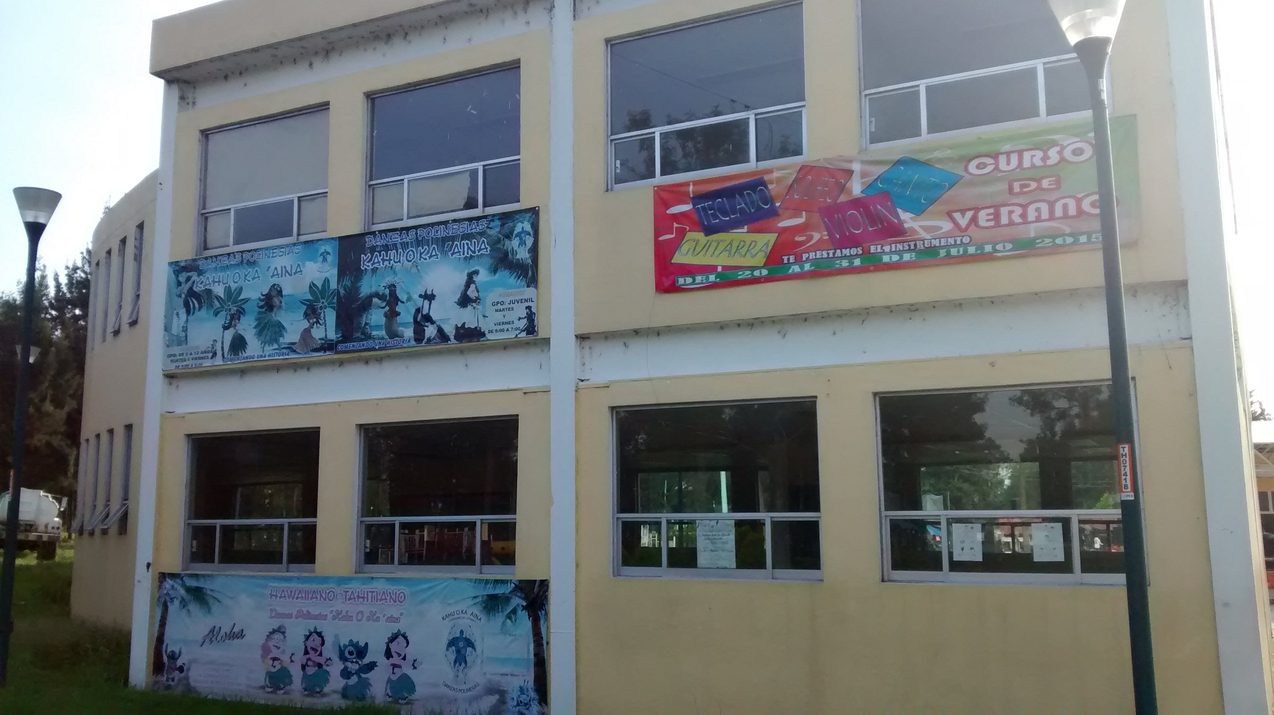 Frente a la sala de artes del bosque de tlahuac